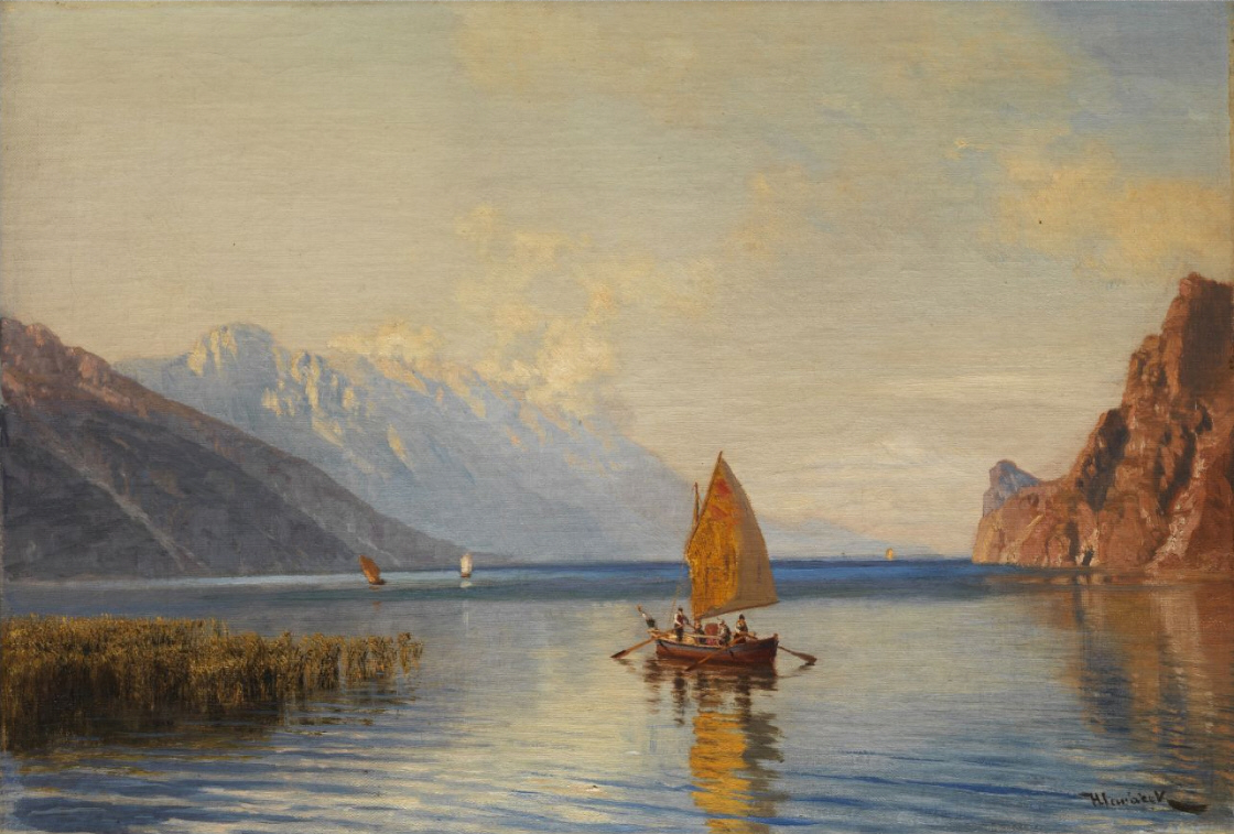 Der Gardasee zwischen Riva und Torbole am Morgen